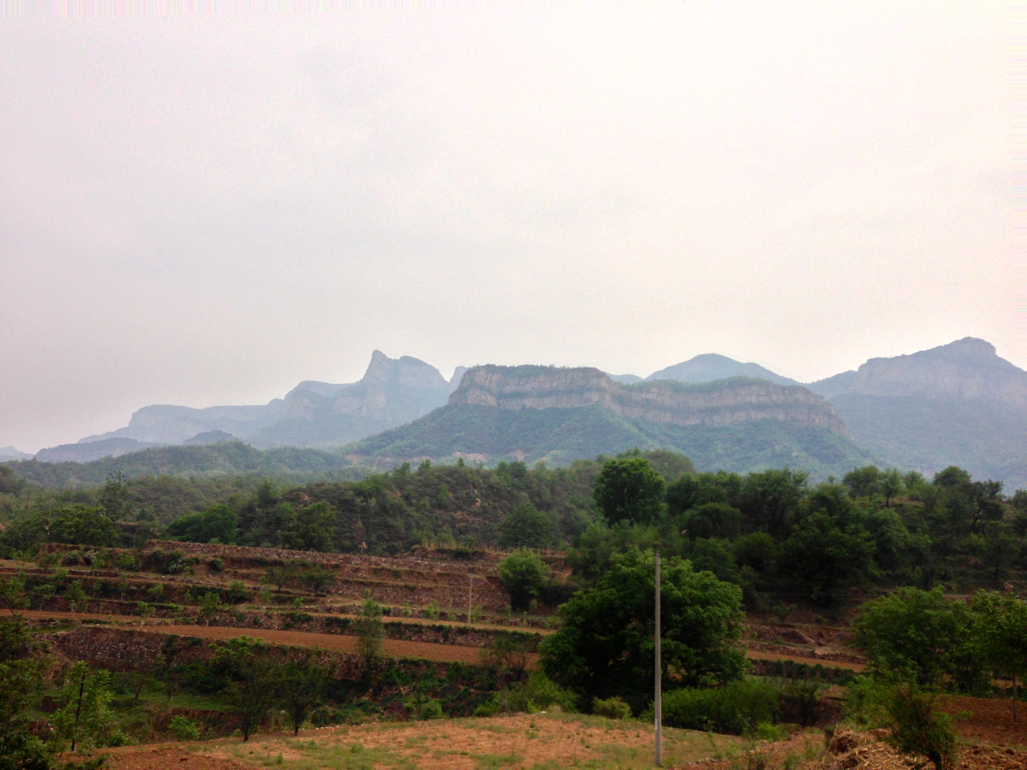 Pingshan, Shijiazhuang, Hebei, China